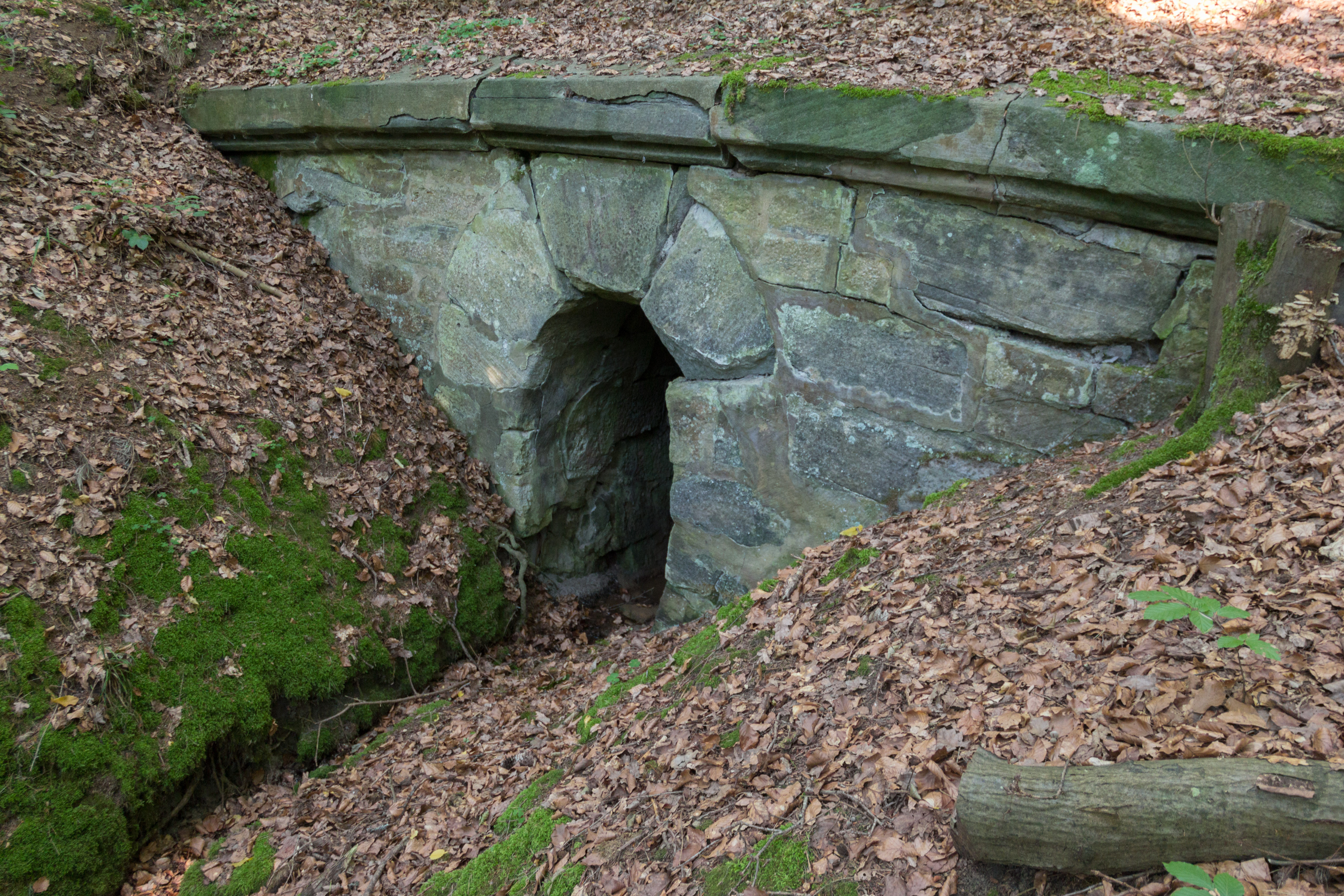 Ludwig-Donau-Main-Kanal, Distellochdamm, Schwarzenbach, Entwässerungsstollen, Blindstollen